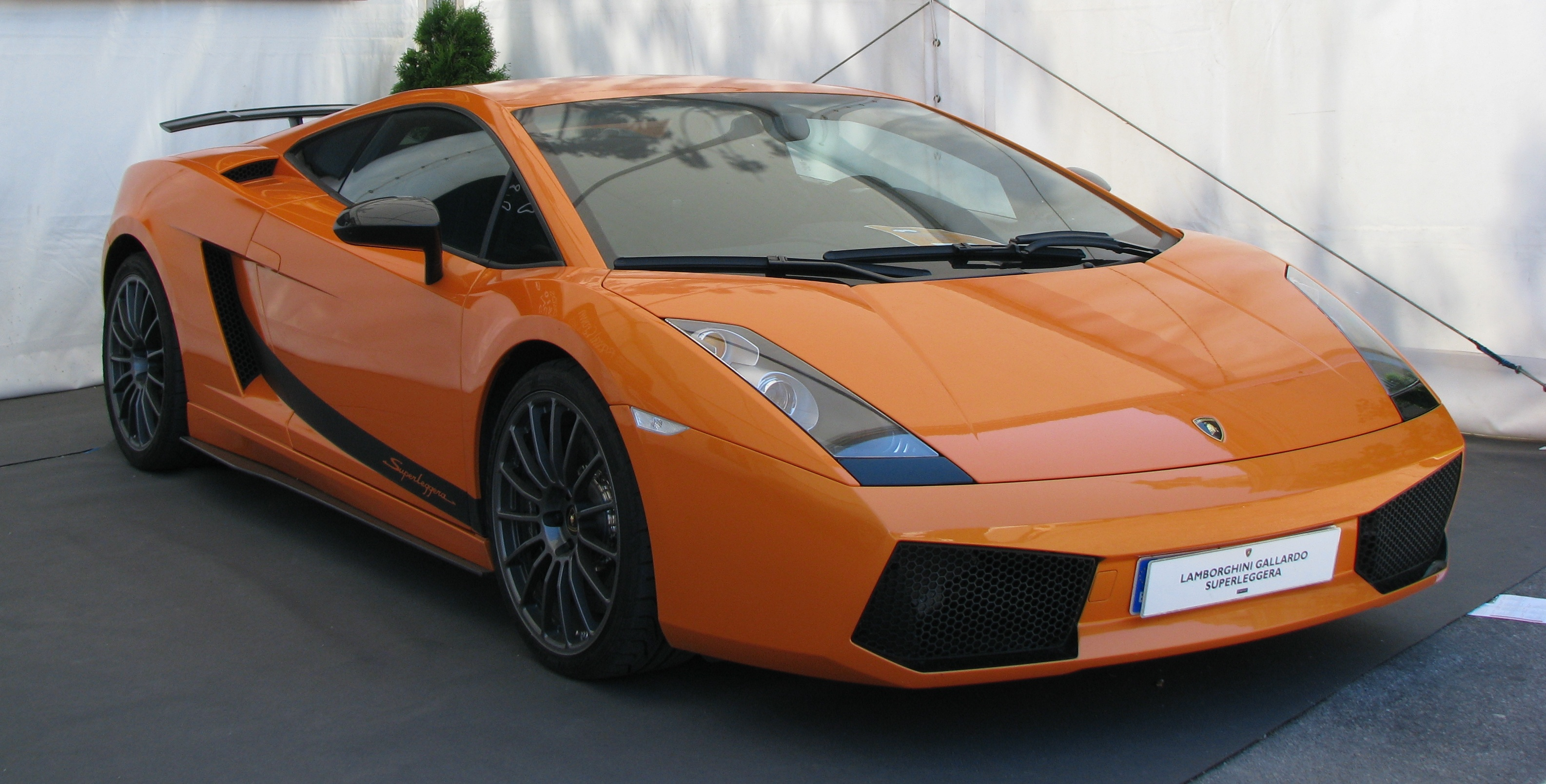 Lamborghini Gallardo Superleggera naranja en el Salón Internacional del Automóvil de Barcelona 2009.